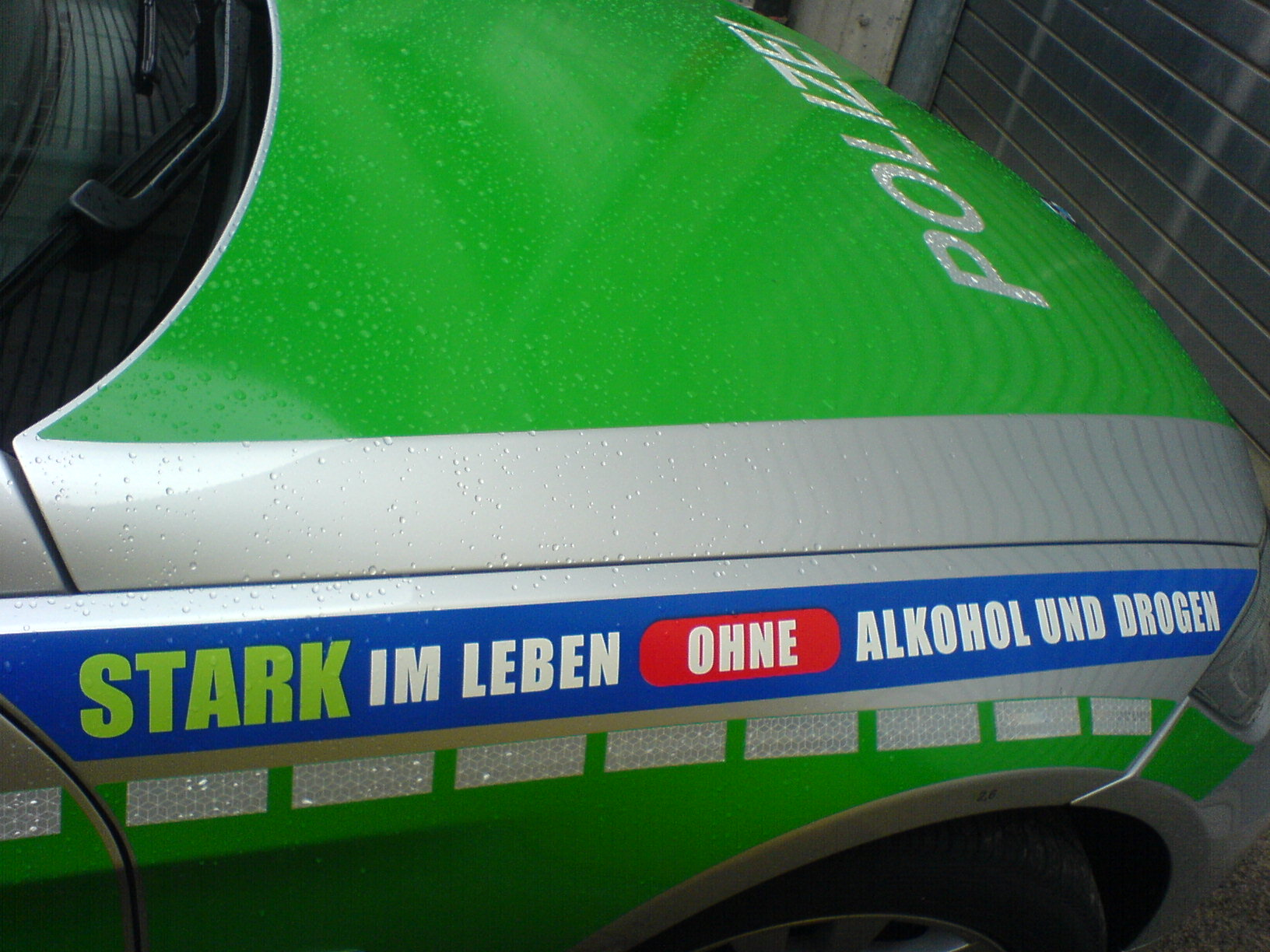 Aufschrift auf Streifenwägen der Bayerischen Polizei: "Stark im Leben ohne Alkohol und Drogen" (Motto des Bayerischen Staatsministeriums des Innern zur Hebung der Verkehrssicherheit u.a.)